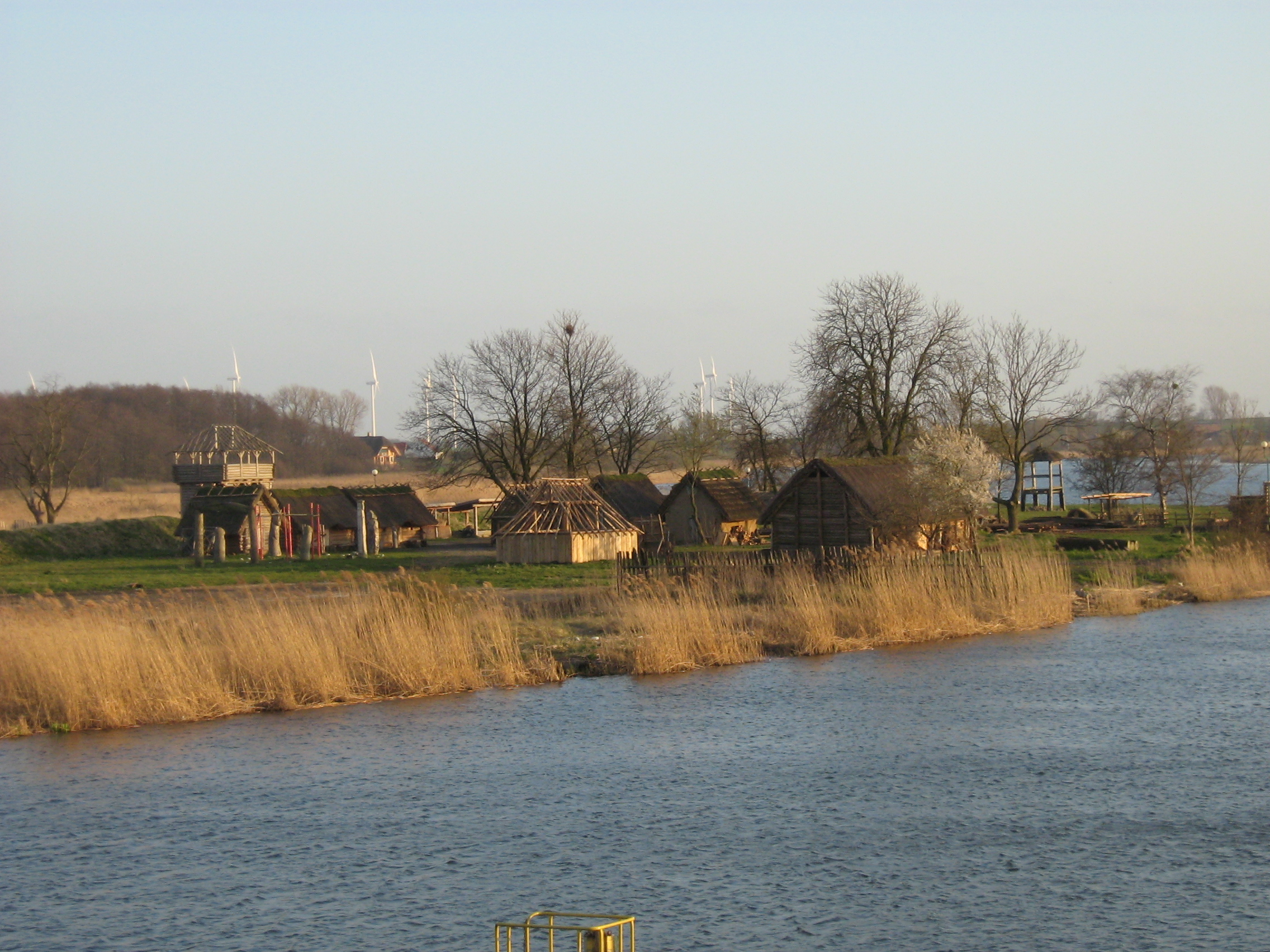 Wioska Wikingów na Wyspie Ostrów koło Wolina